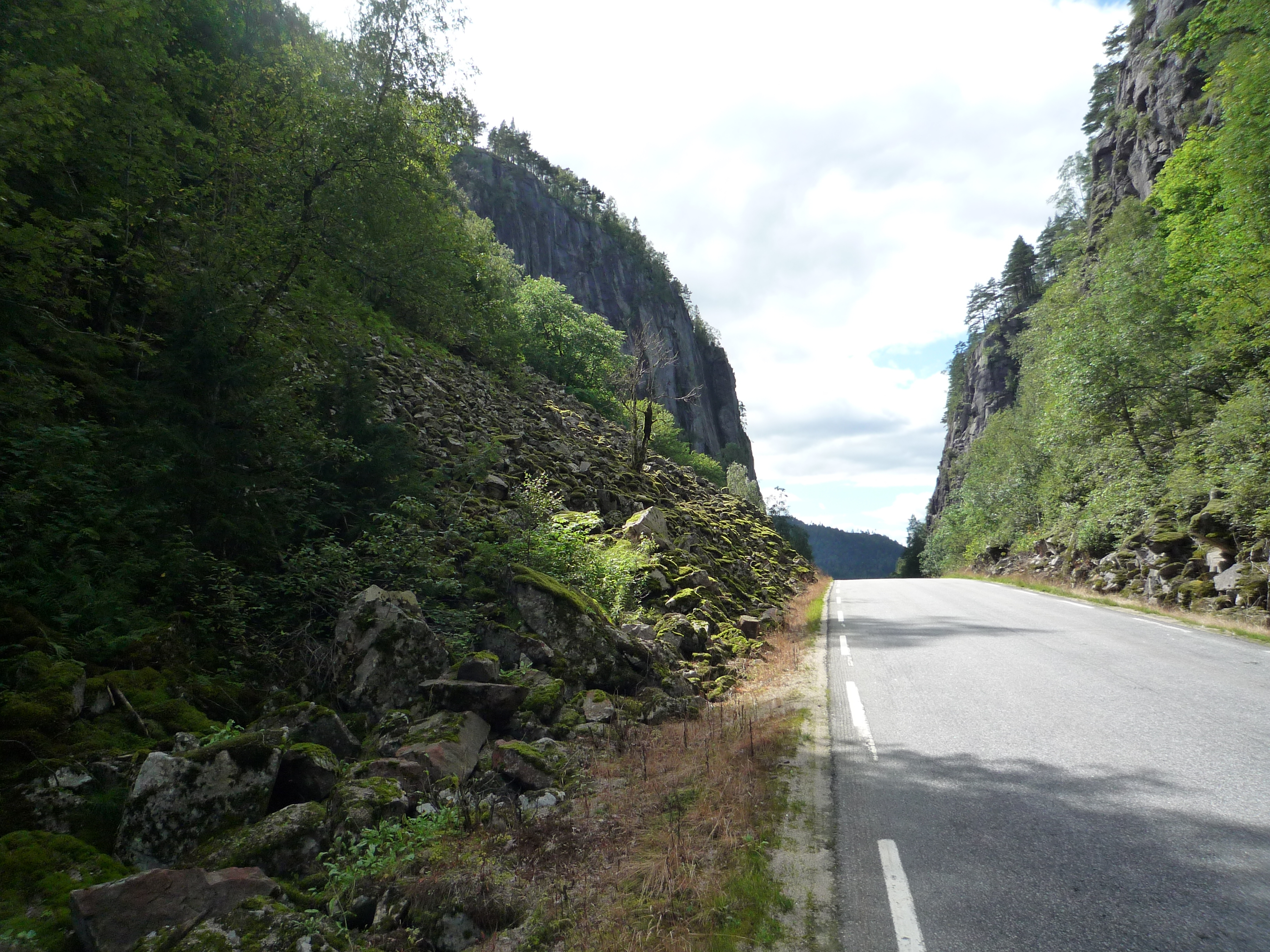 20110806 19 Sveindal